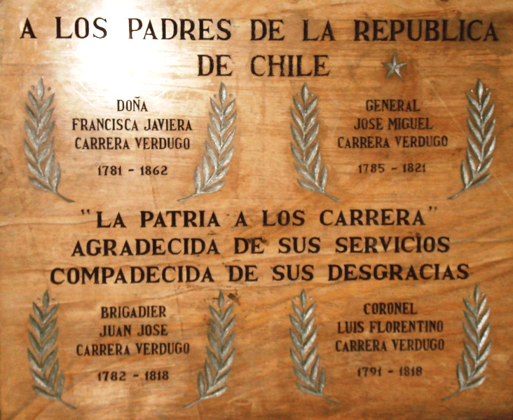 Vista de una placa conmemorativa a los hemanos Carrera en la Catedral de Santiago de Chile.